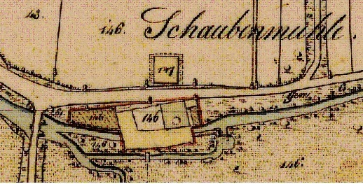 Ortsteil und Mühle, Schaubenmühle im Urkataster von 1833